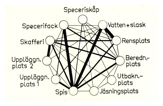 Frkvenser av olika förflyttningar i köket; linjetjockleken motsvarar fekvensintensiteten. Efter förlagan i "BYGG" kapitel 731:2., från 1962.